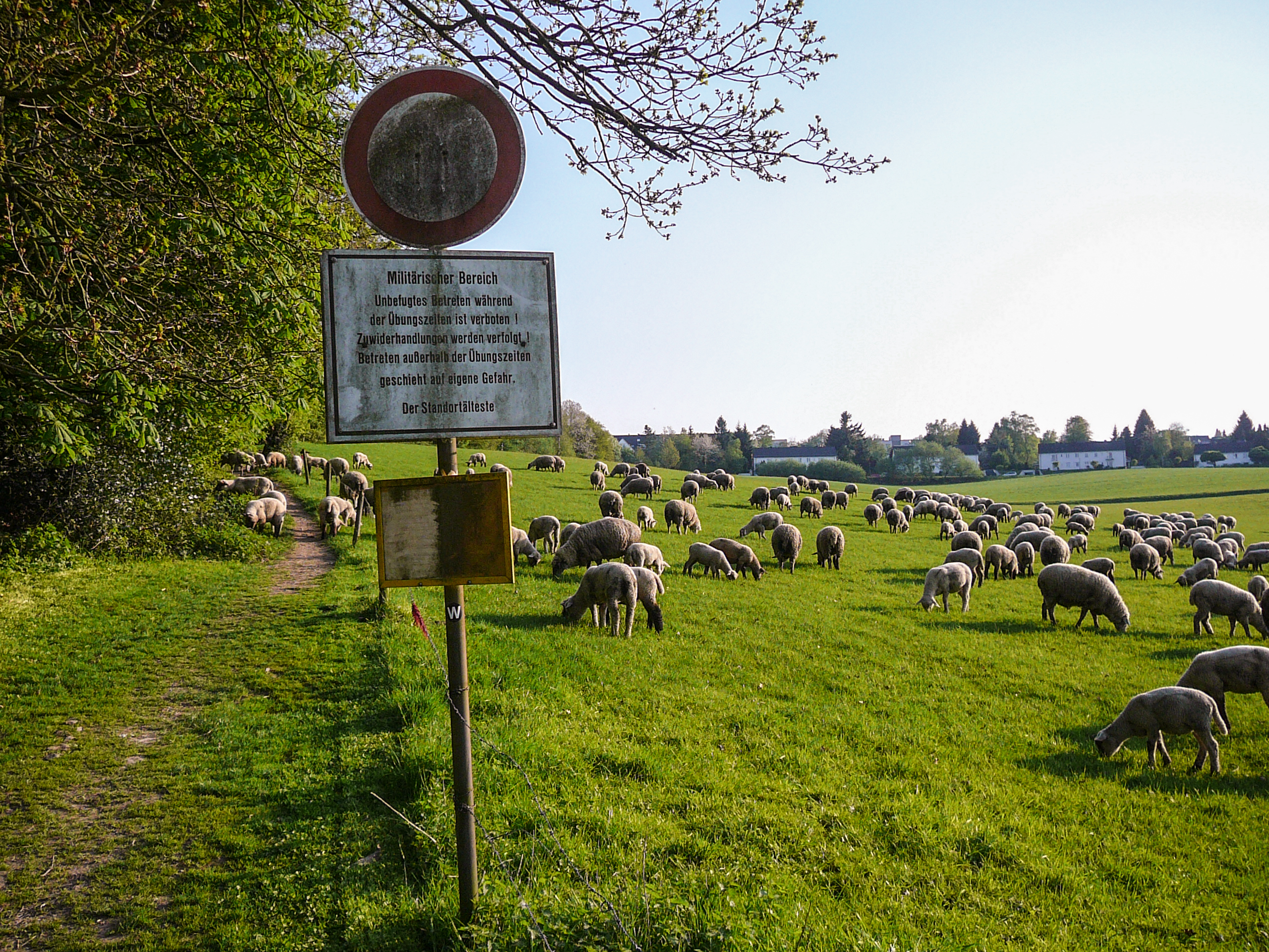 Marpe, Wuppertal